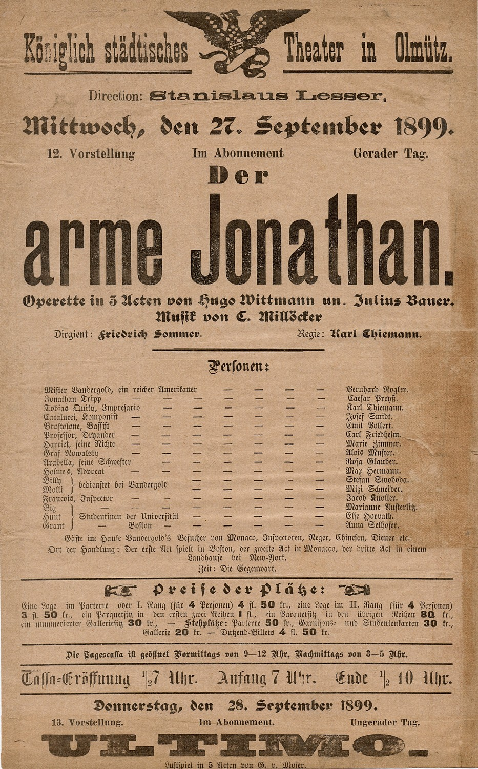 Theaterzettel vom Mittwoch, den 27. September 1899. Königlich städtisches Theater in Olmütz. Direction: Stanislaus Lesser. "Der arme Jonathan" (1890). Operette in 3 Acten von Hugo Wittmann und Julius Bauer. Musik von Carl Millöcker. Dirigent: Friedrich Sommer, Regie: Karl Thiemann.